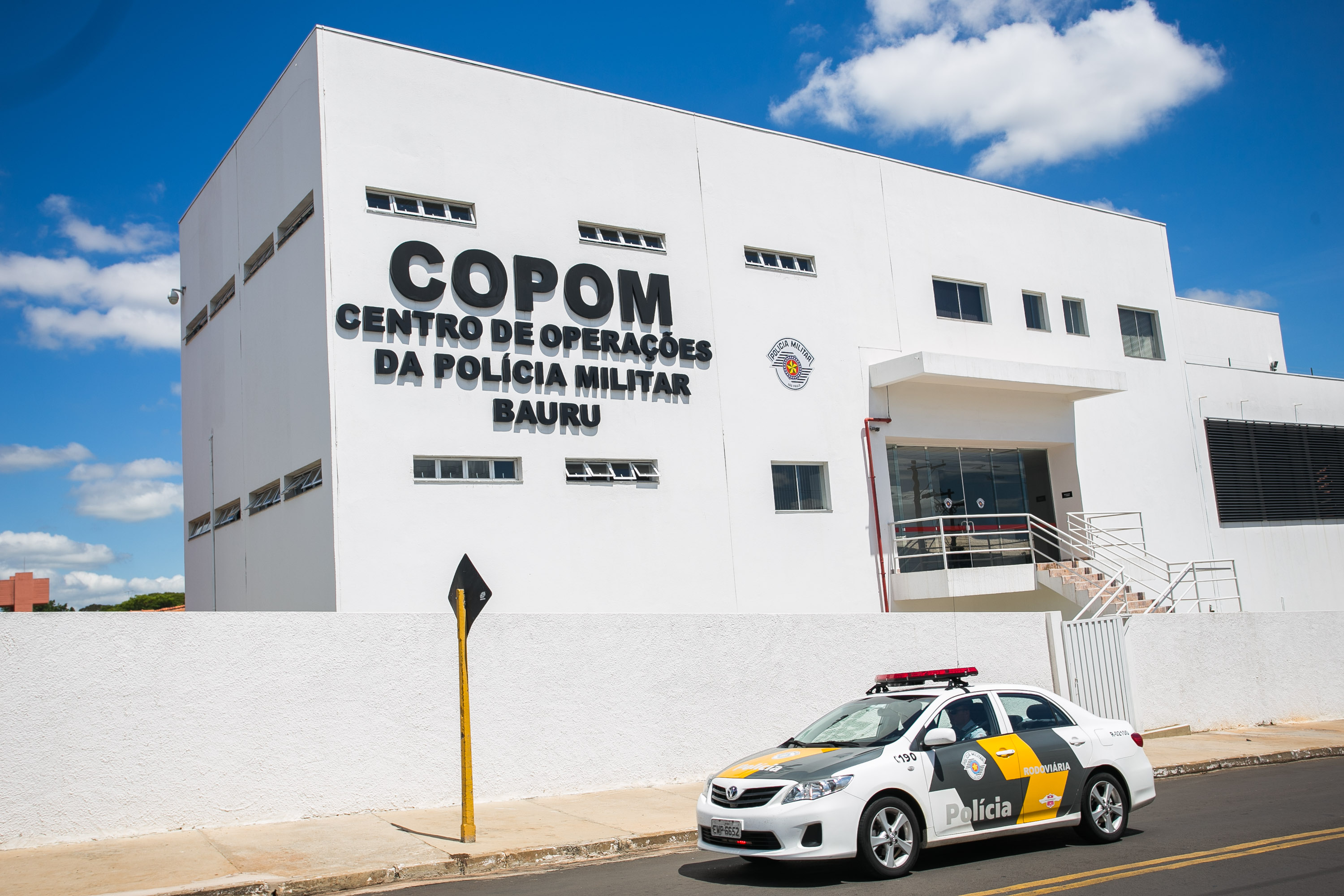 O governador Geraldo Alckmin durante visita à sede do Copom. Data: 28/02/2015. Local: Bauru/SP.Foto: Edson Lopes Jr/A2AD